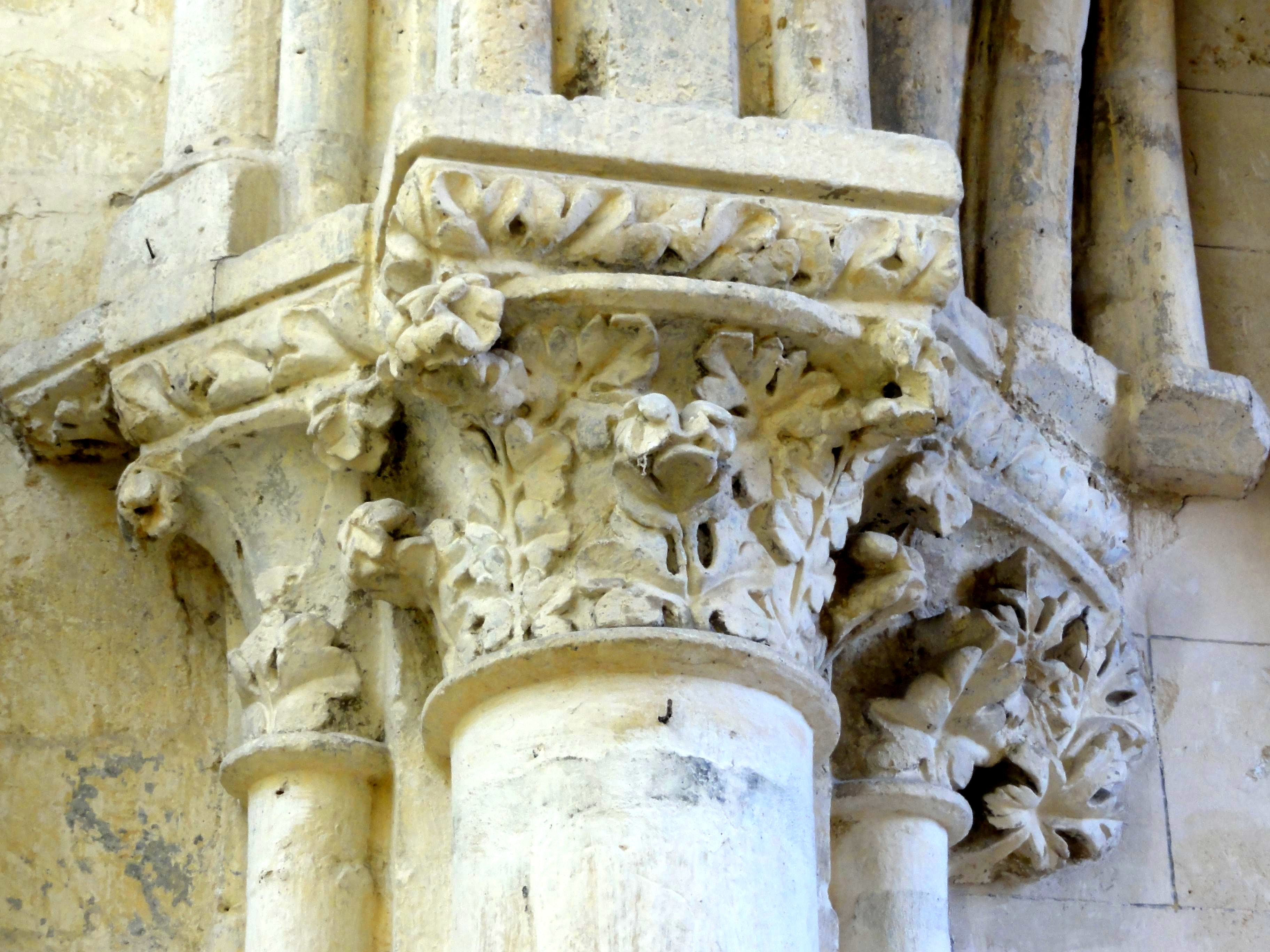 Colonnes engagées au début des grandes arcades du nord, chapiteaux.